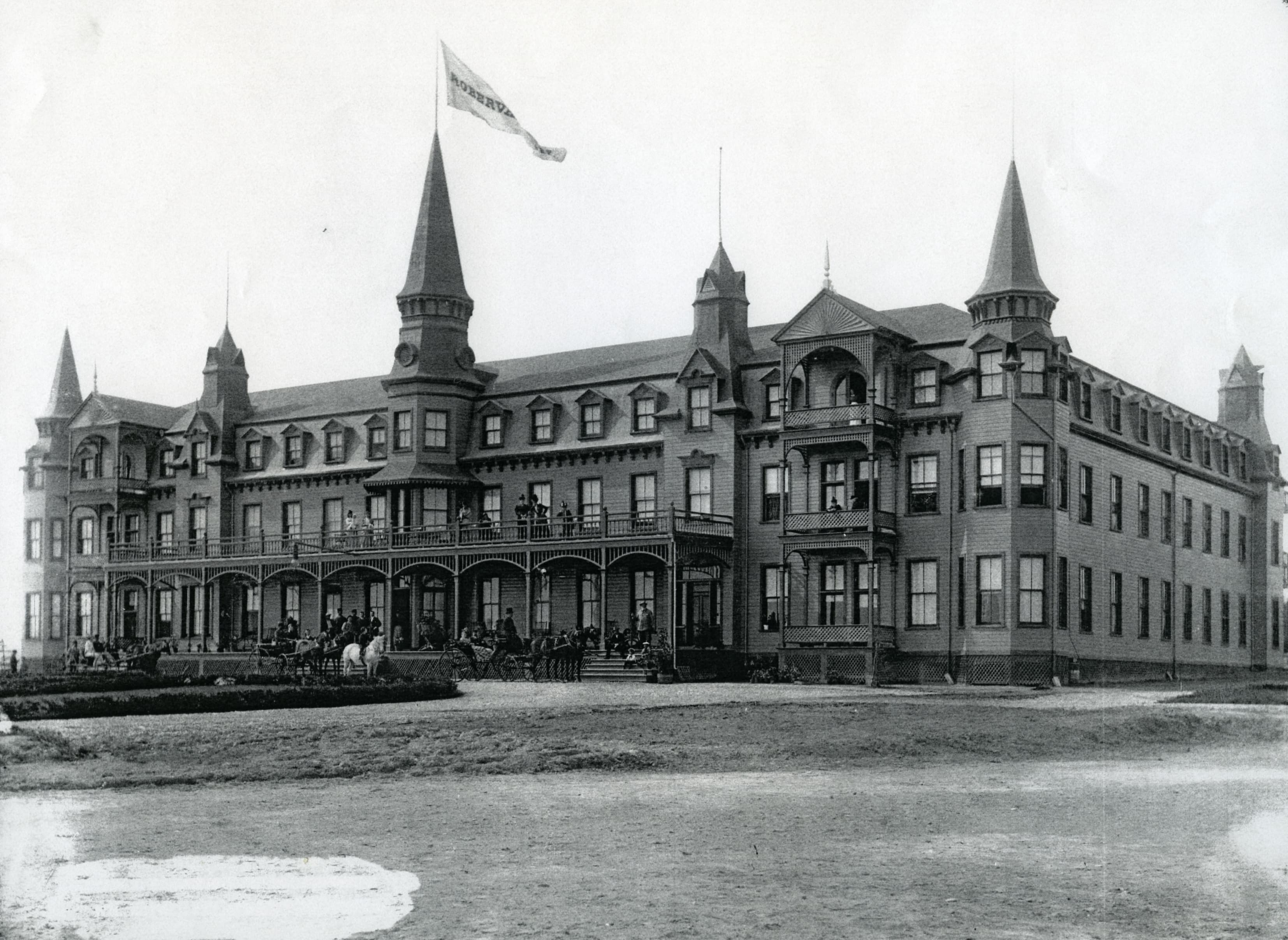 Hôtel Roberval (Québec). Images tirées des fonds de la Société d'histoire du Lac-Saint-Jean. L'hôtel est construit en 1888 par Horace Jansen Beemer, entrepreneur pour le Quebec and Lake St-John Railway; il est agrandi en 1891 et sera détruit par le feu en 1908.